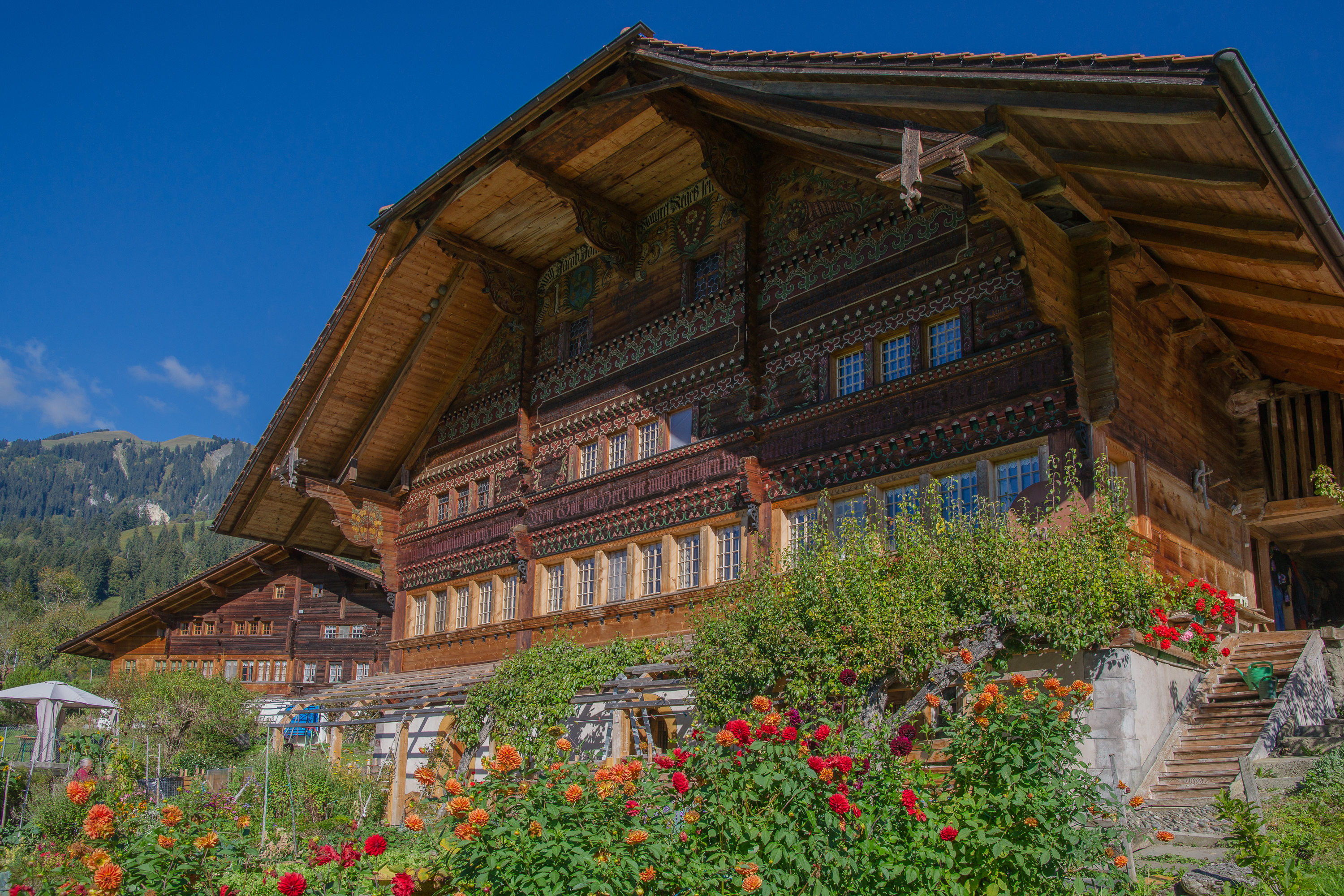 Vennerhaus, Büel 201, Totale Südfassade mit Vorgarten